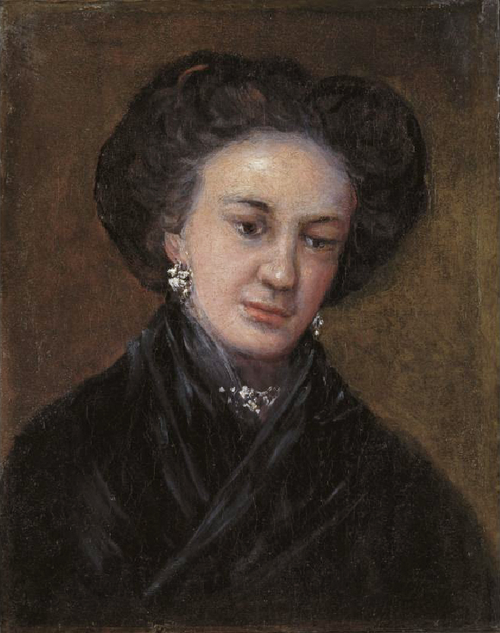 Retrato de Rita Luna encontrado en la casa de Goya en 1818.